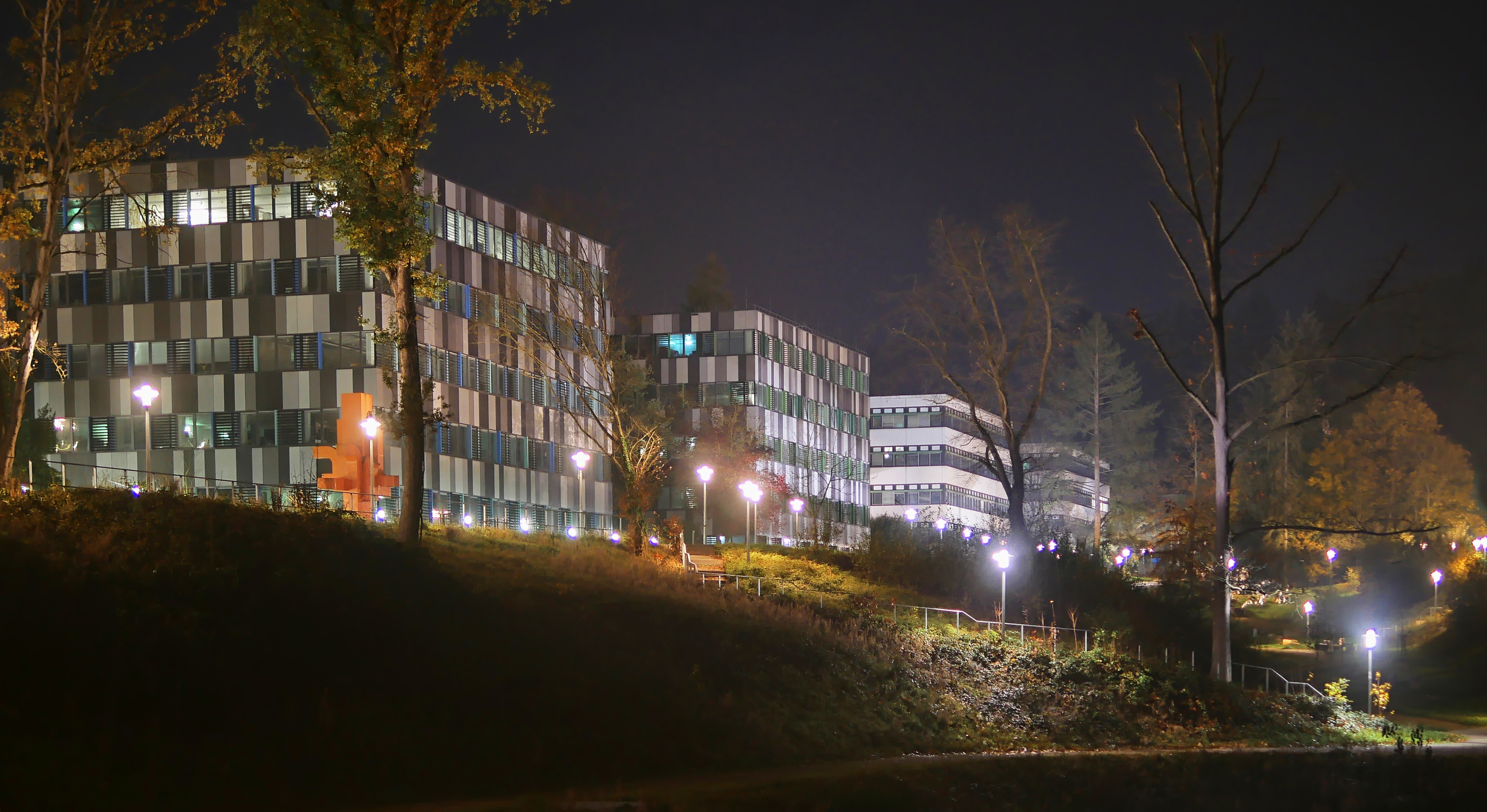 Hochschule Trier - Hauptkampus Schneidershof von Norden